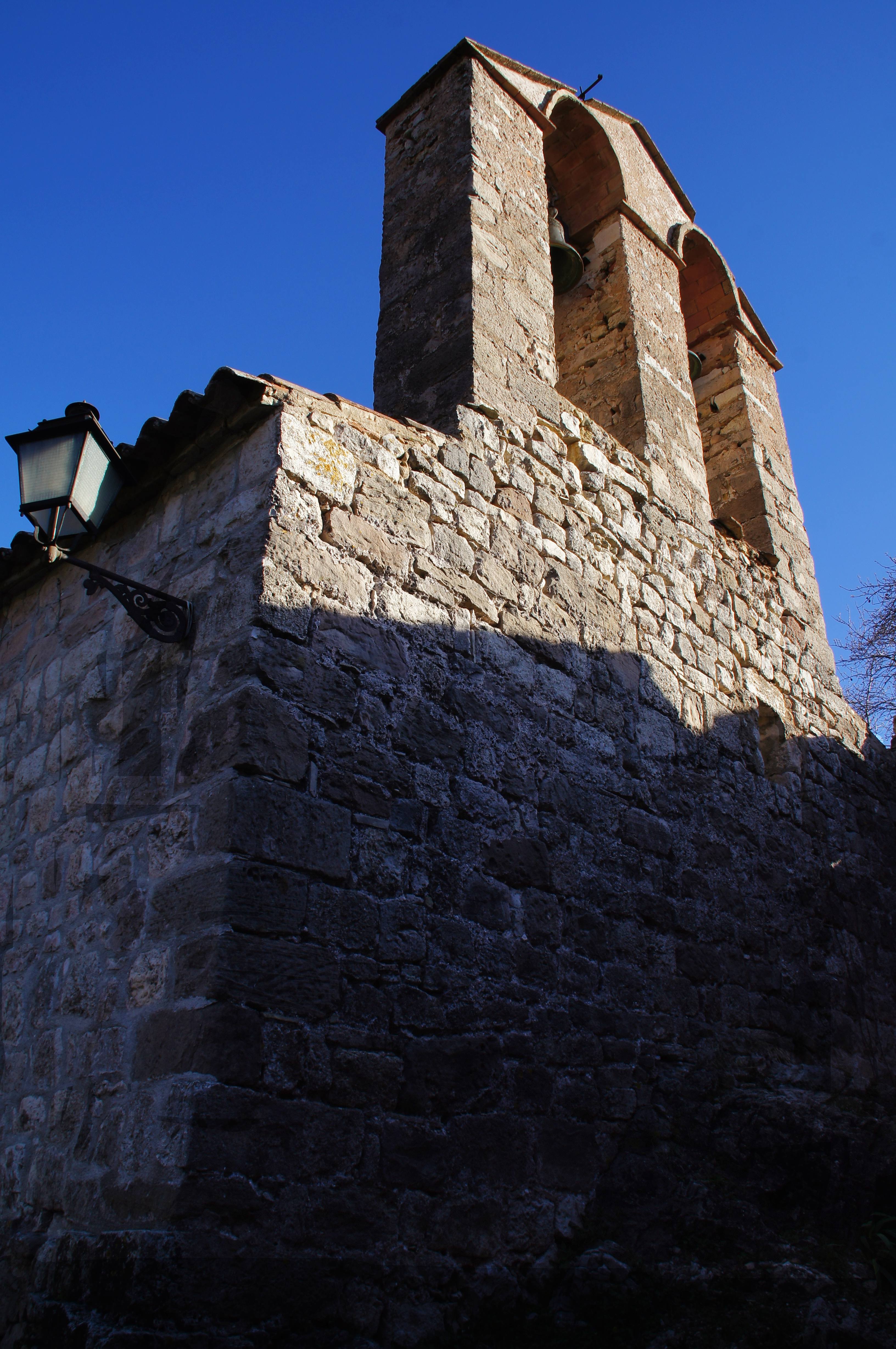 Esglesiola de Sant Andreu (Mont-ral)